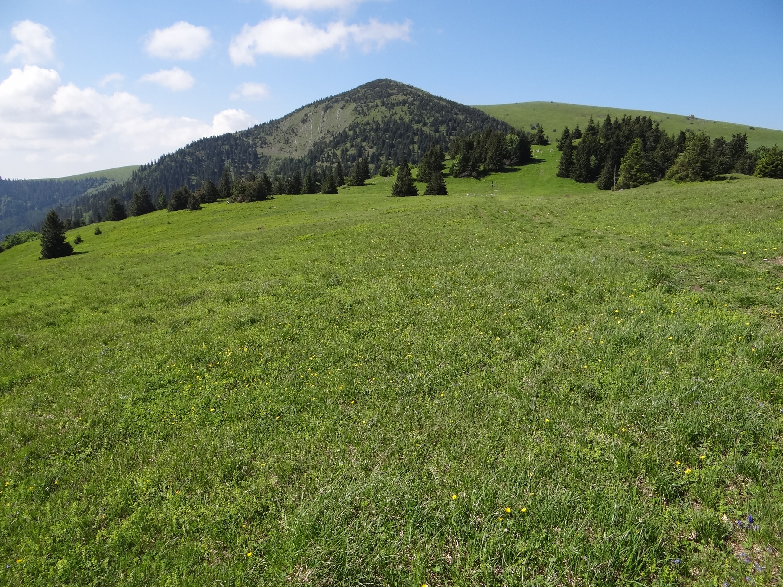 Koniarky, Suchý vrch, Ostredok (Veľká Fatra)